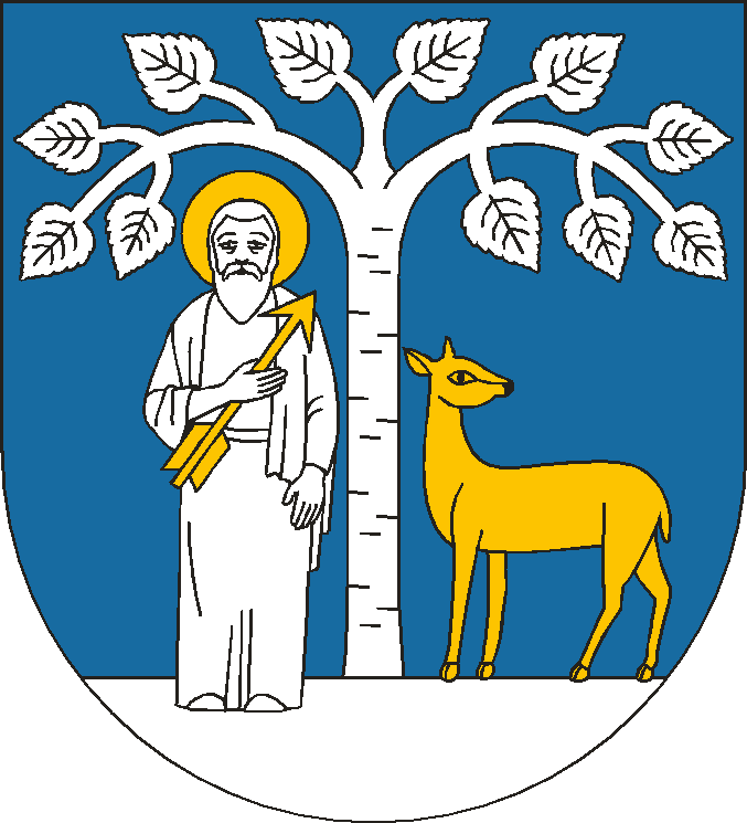 Herb gminy Brzeźnio